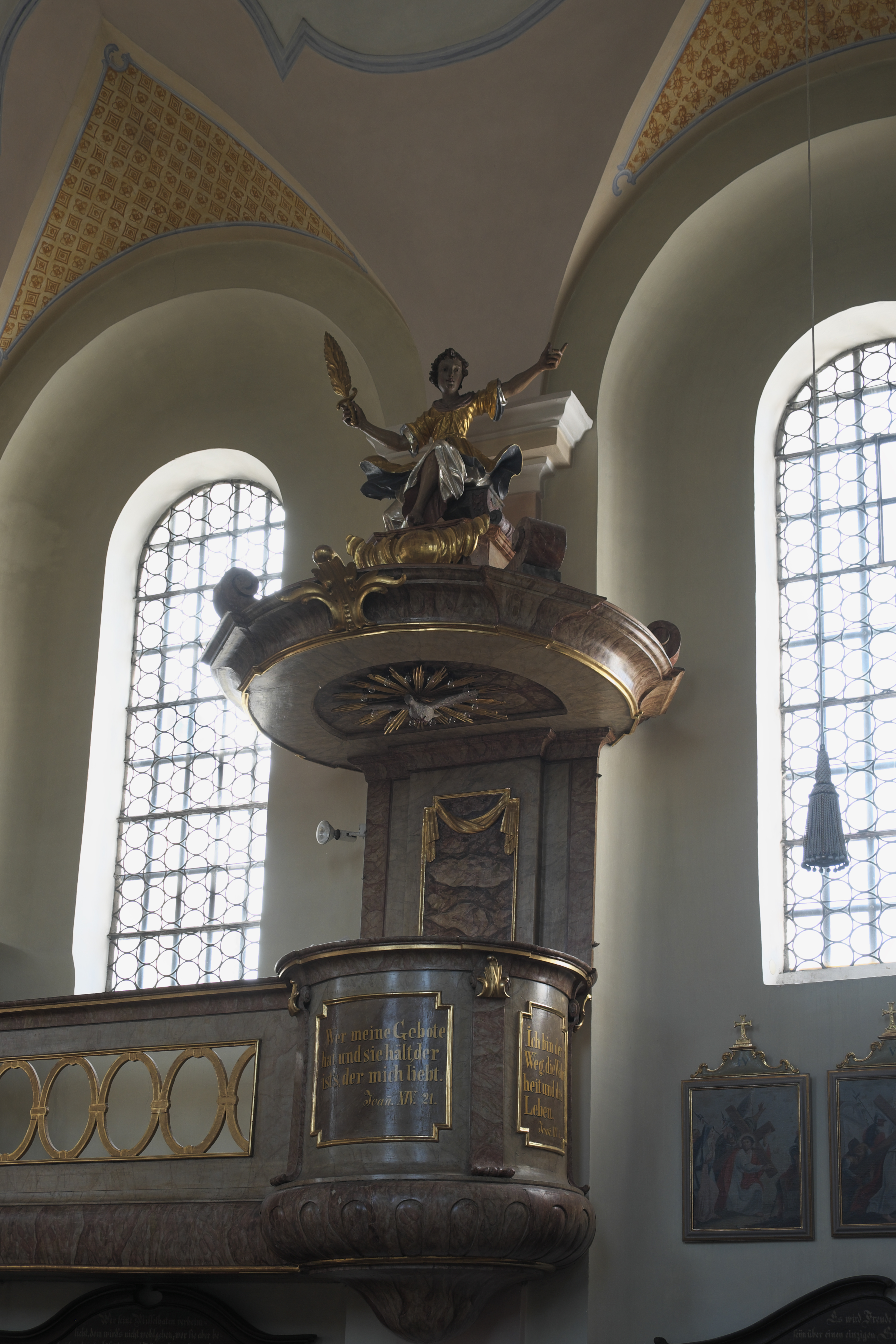 Katholische Pfarrkirche St. Florian in Fraunberg im Landkreis Erding (Bayern/Deutschland), Kanzel